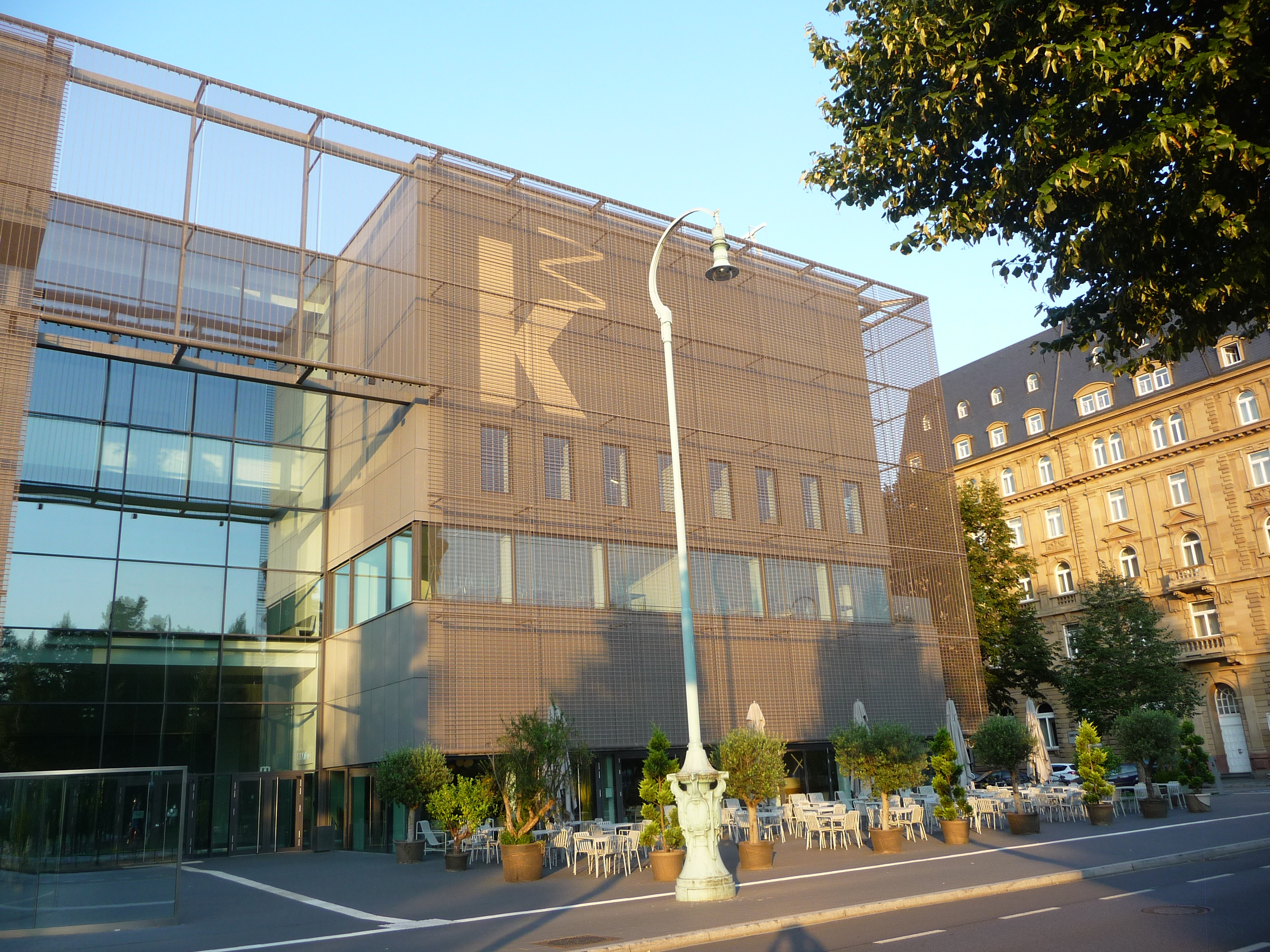 Die Kunsthalle Mannheim ist ein Museum für moderne und zeitgenössische Kunst in Mannheim. Sie prägt seit über 100 Jahren das kulturelle Leben der Industriestadt. Deutschlandweit zählt sie mit Werken von Édouard Manet bis Francis Bacon und einem Skulpturenschwerpunkt – im Spektrum von Auguste Rodin und Wilhelm Lehmbruck über Henry Moore und Marino Marini bis zu Mario Merz und Richard Long – zu den renommiertesten bürgerschaftlichen Sammlungen der deutschen und internationalen Moderne bis zur Gegenwart.